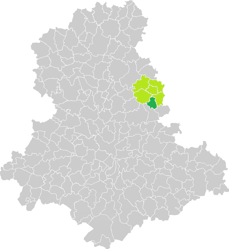 Carte de situation de la commune de La Jonchère-Saint-Maurice (en vert foncé) dans le votre Canton (en vert clair) sur une carte des communes de la Haute-Vienne